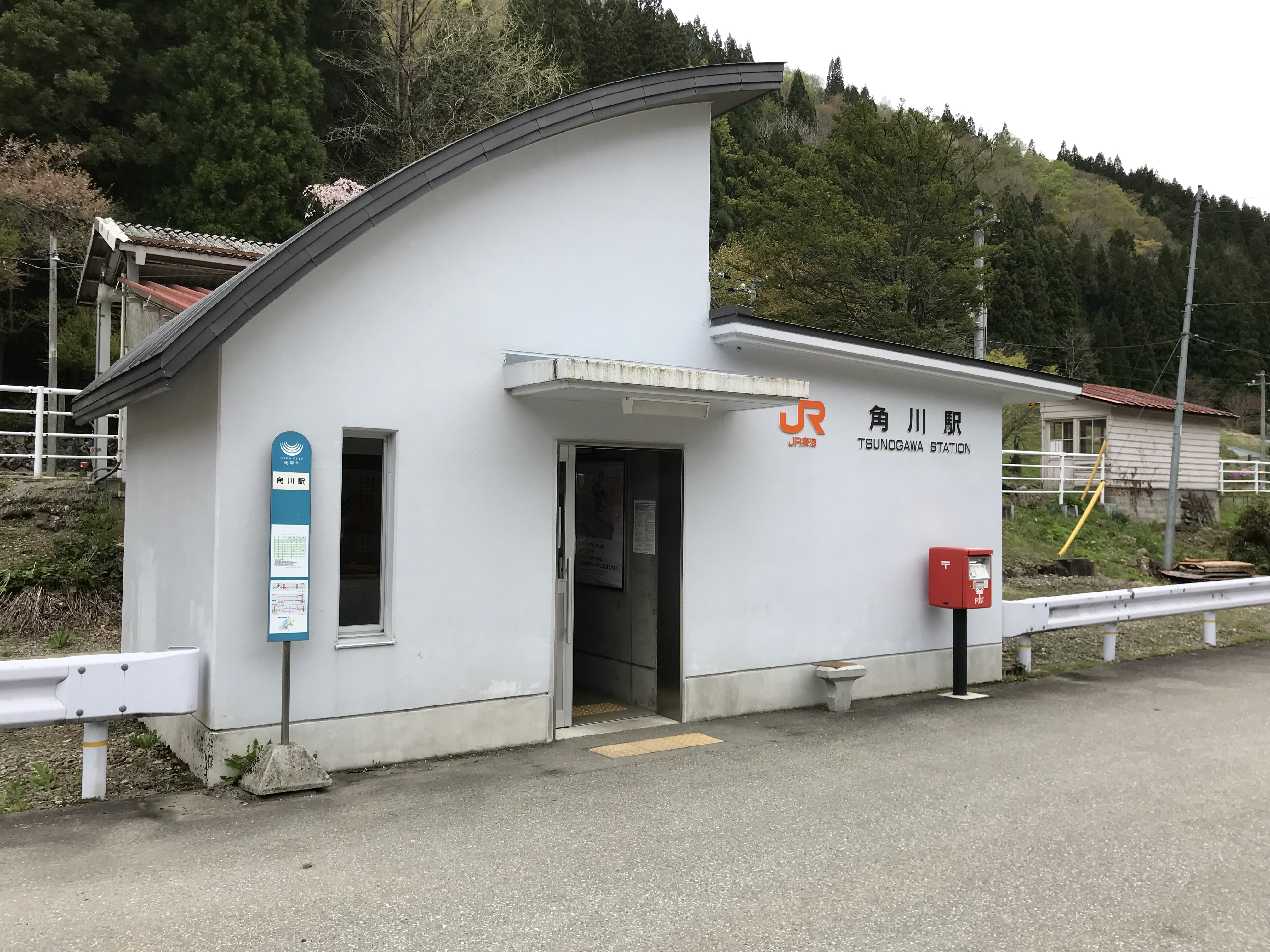 JR東海高山本線角川駅駅舎